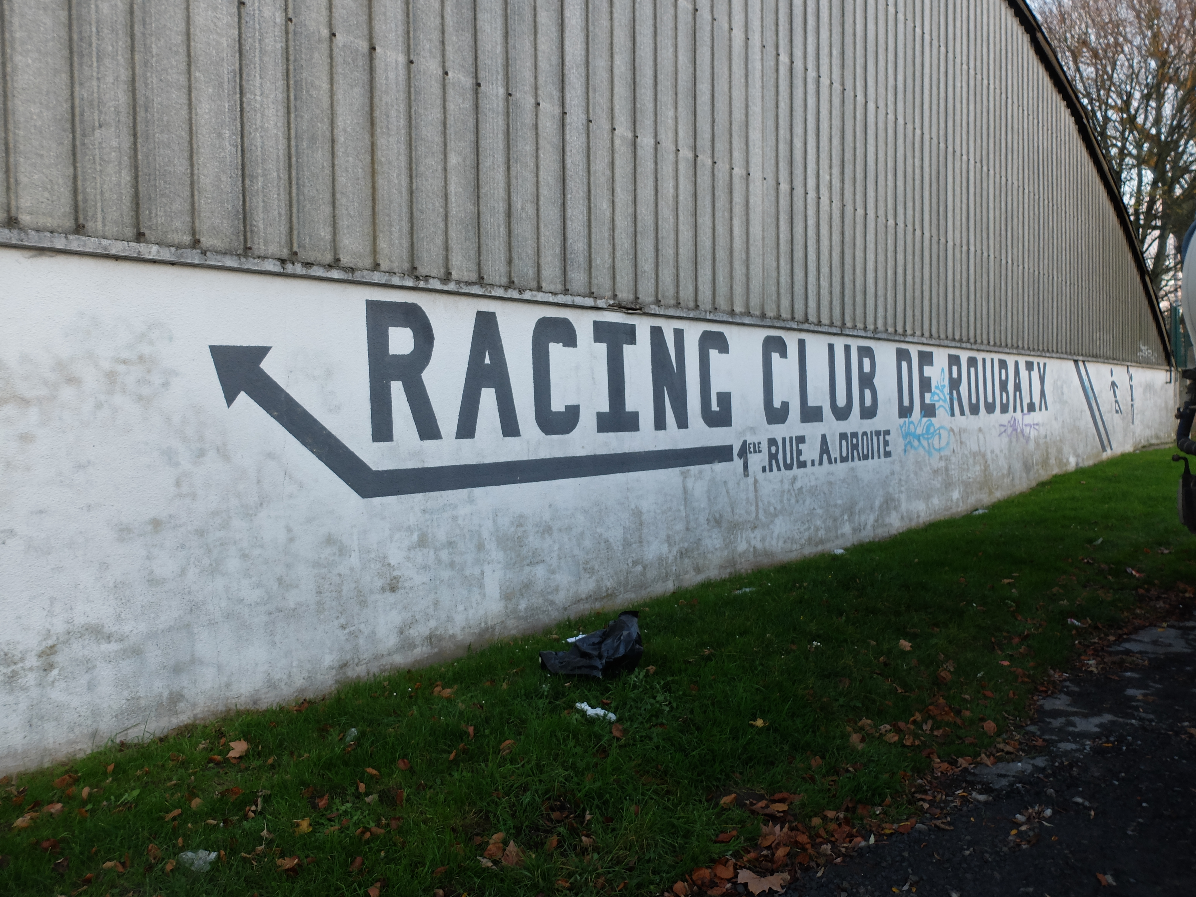 Inscription murale renvoyant au Racing Club de Roubaix.